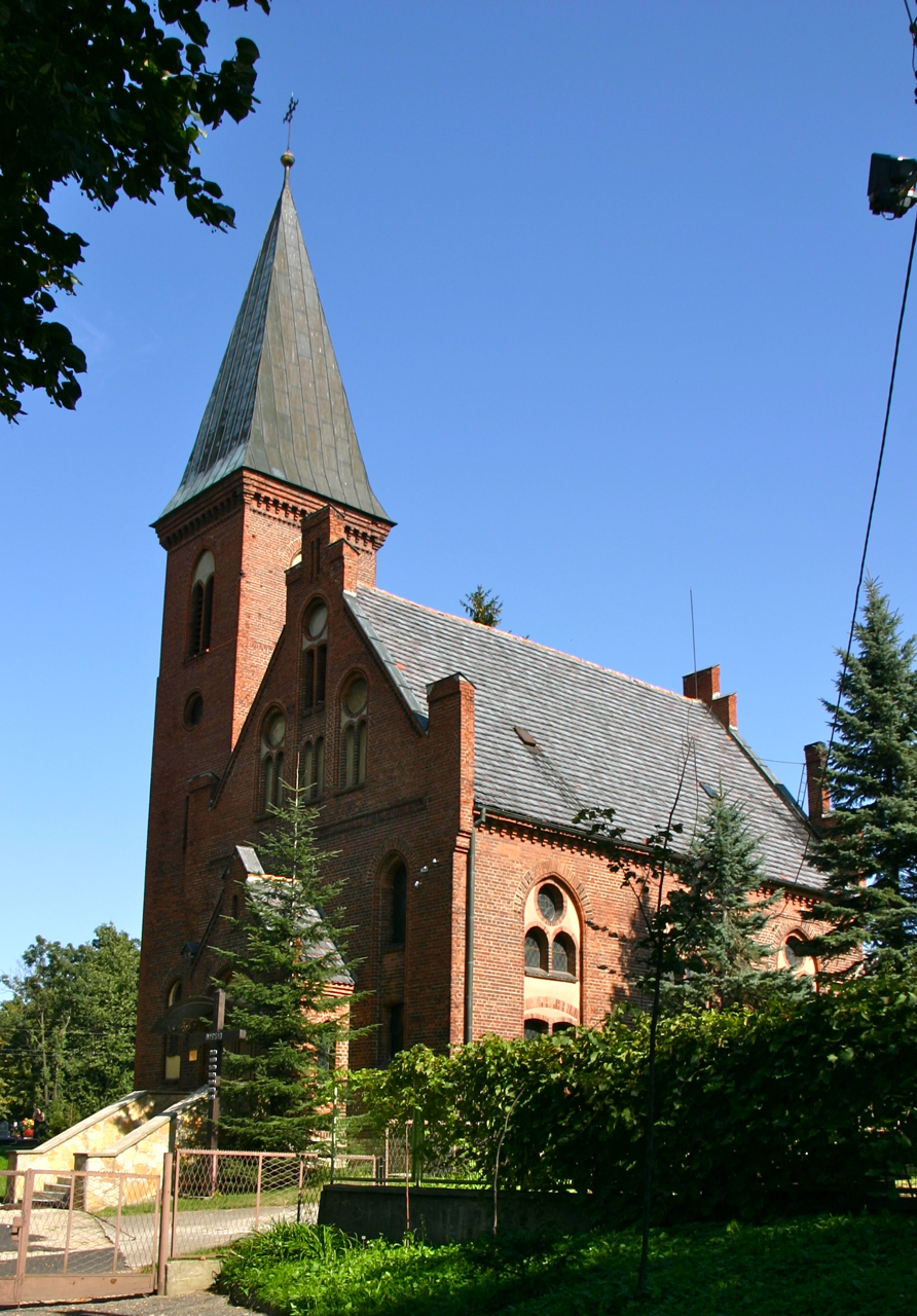 Olszynka - pierwotnie kościół ewangelicki, od 1945 kościół rzymskokatolicki pw. Matki Boskiej Anielskiej, 1899.